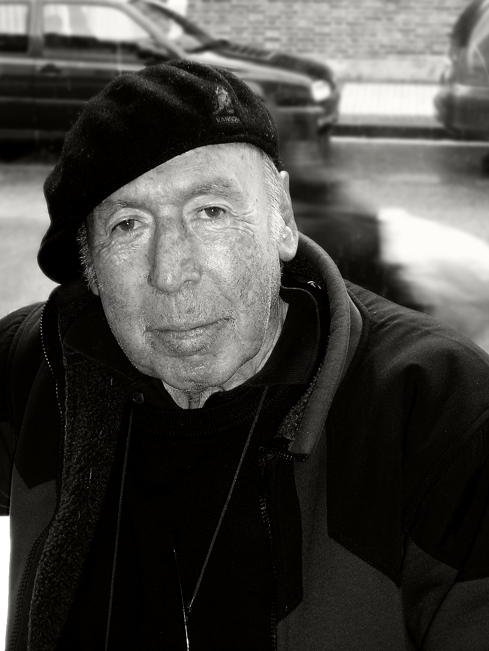 Mikel Laboa abeslaria